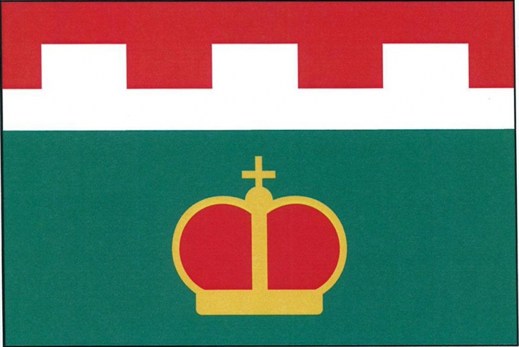 vlajka, Račice, okres Třebíč